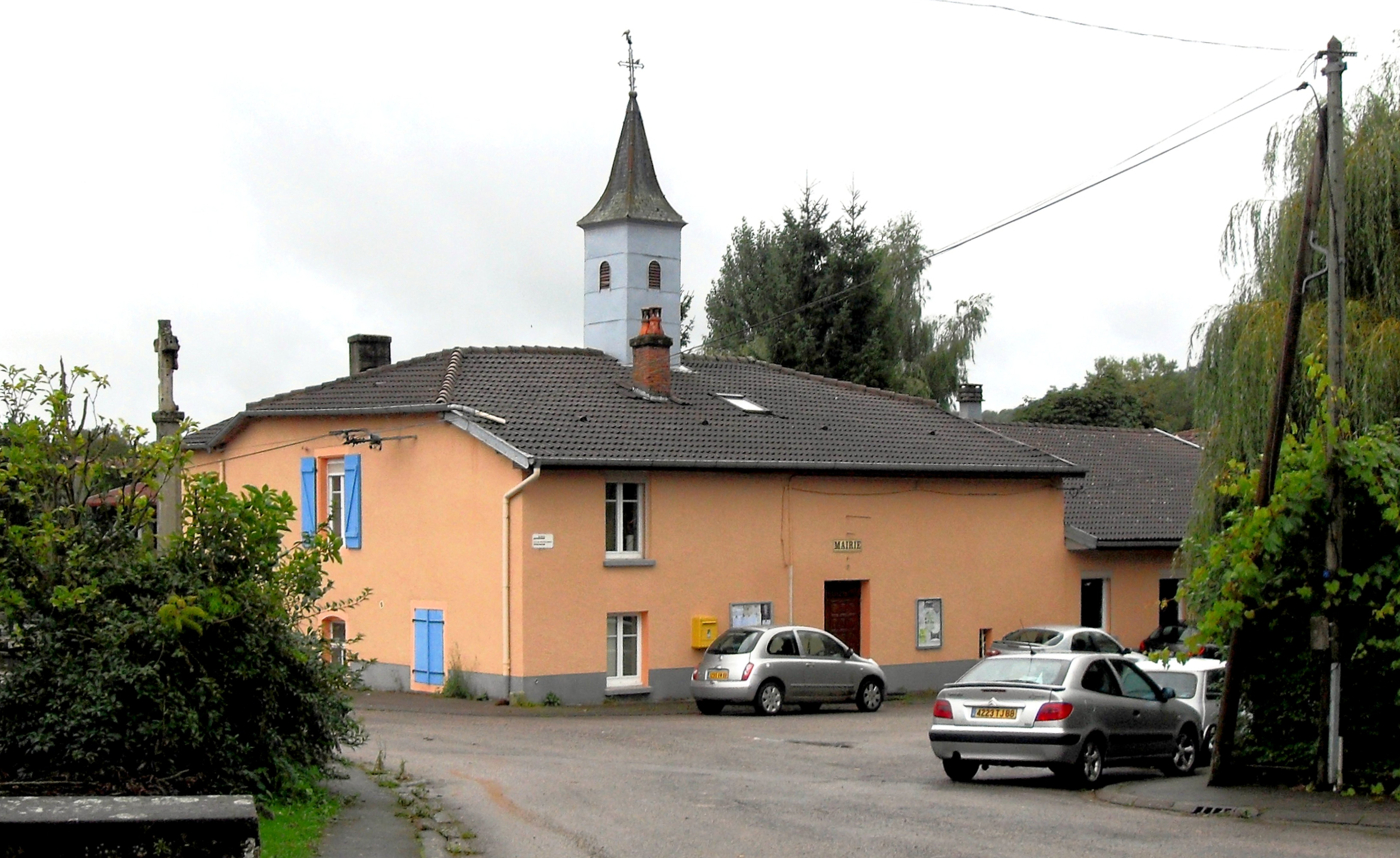 La mairie de Sans-Vallois